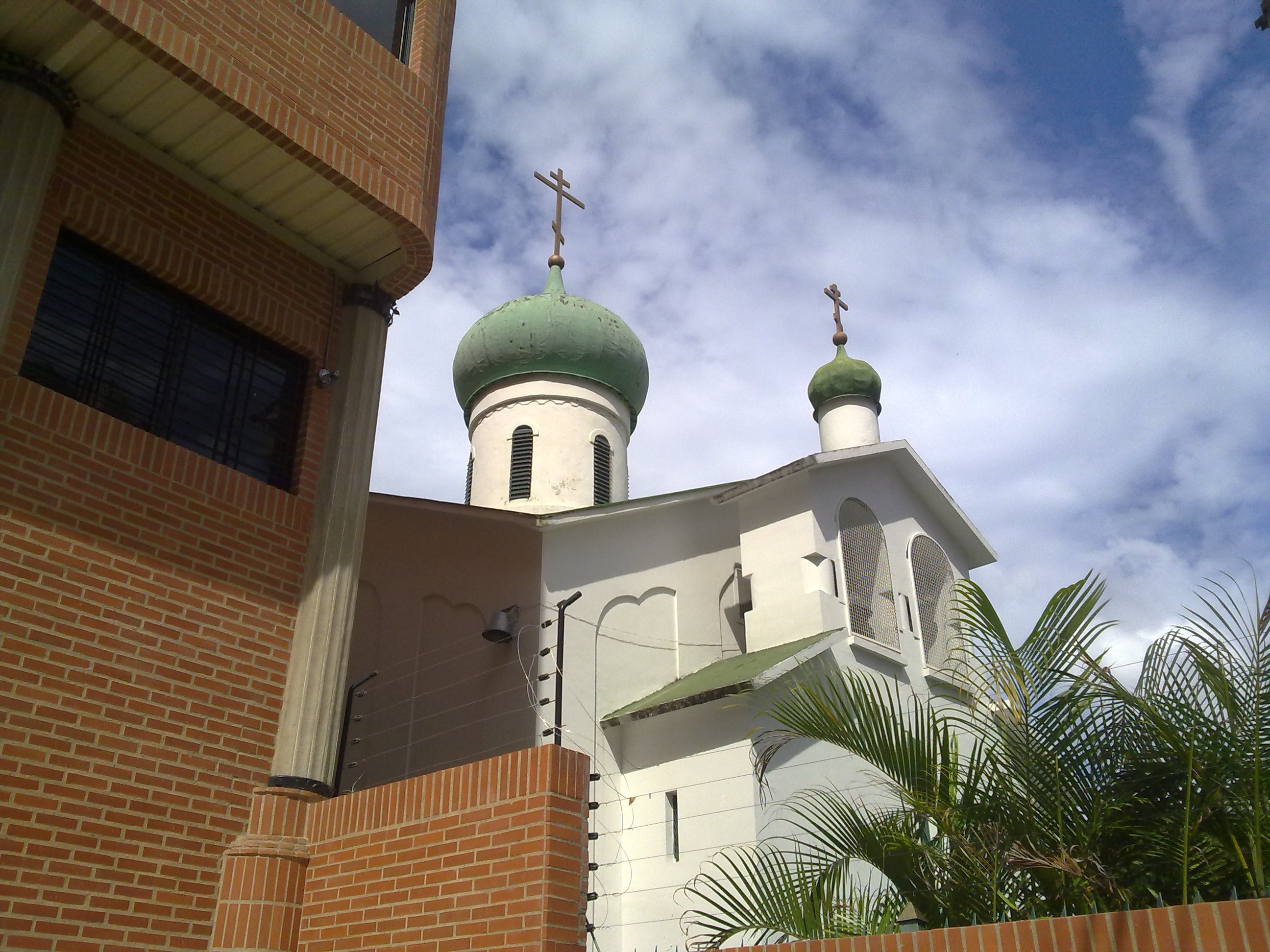 Iglesia Ortodoxa Rusa